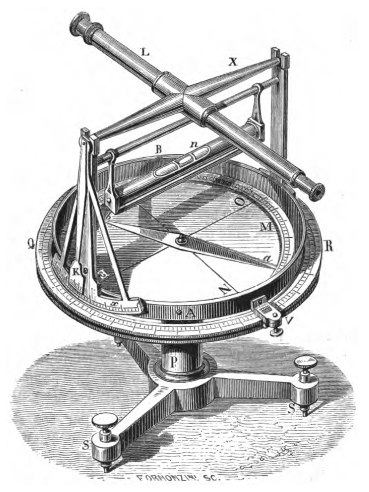 Boussole de déclinaison de Lenoir (Étienne).